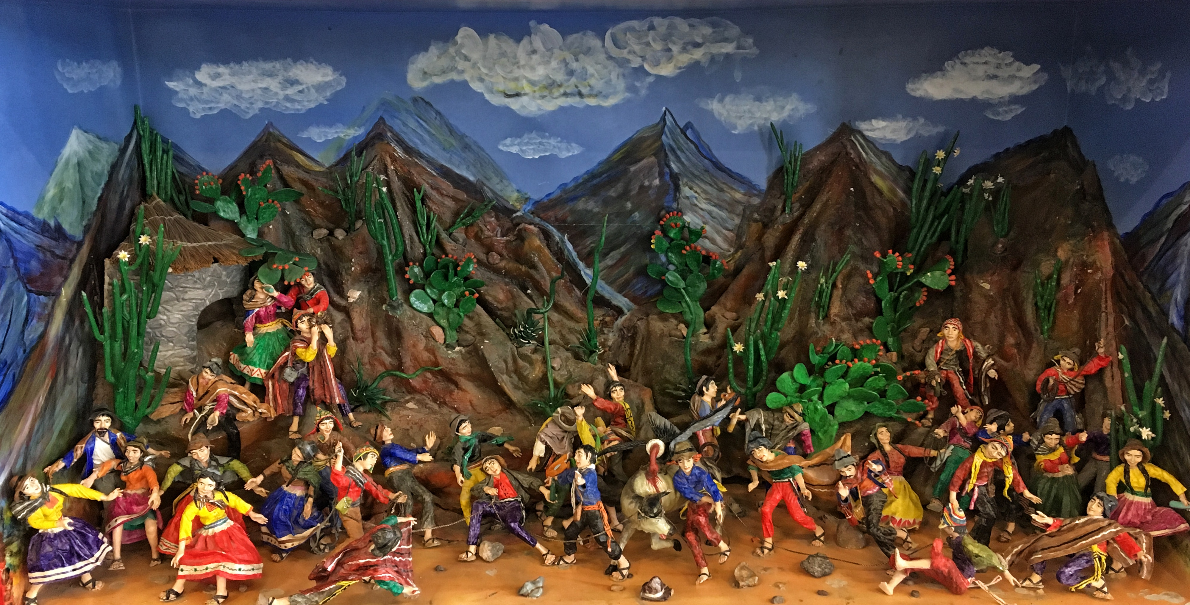 Yawar fiesta, detalle de retablo ayacuchano